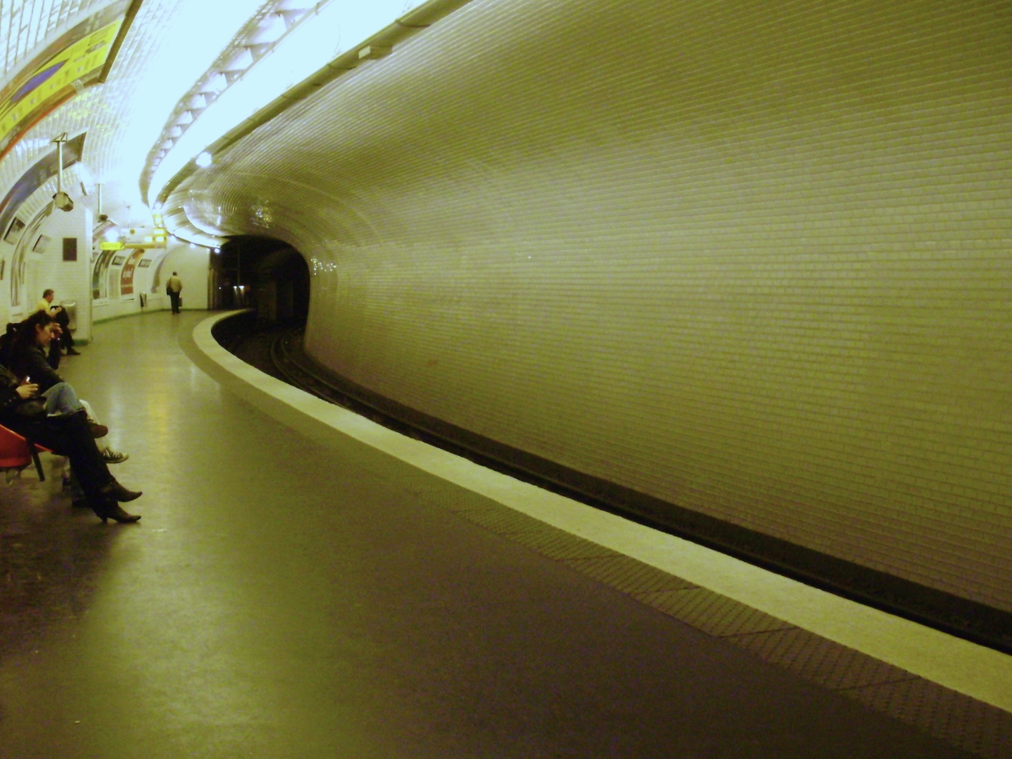 Quai de la station Chardon-Lagache du métro de Paris (vue depuis le début du quai)